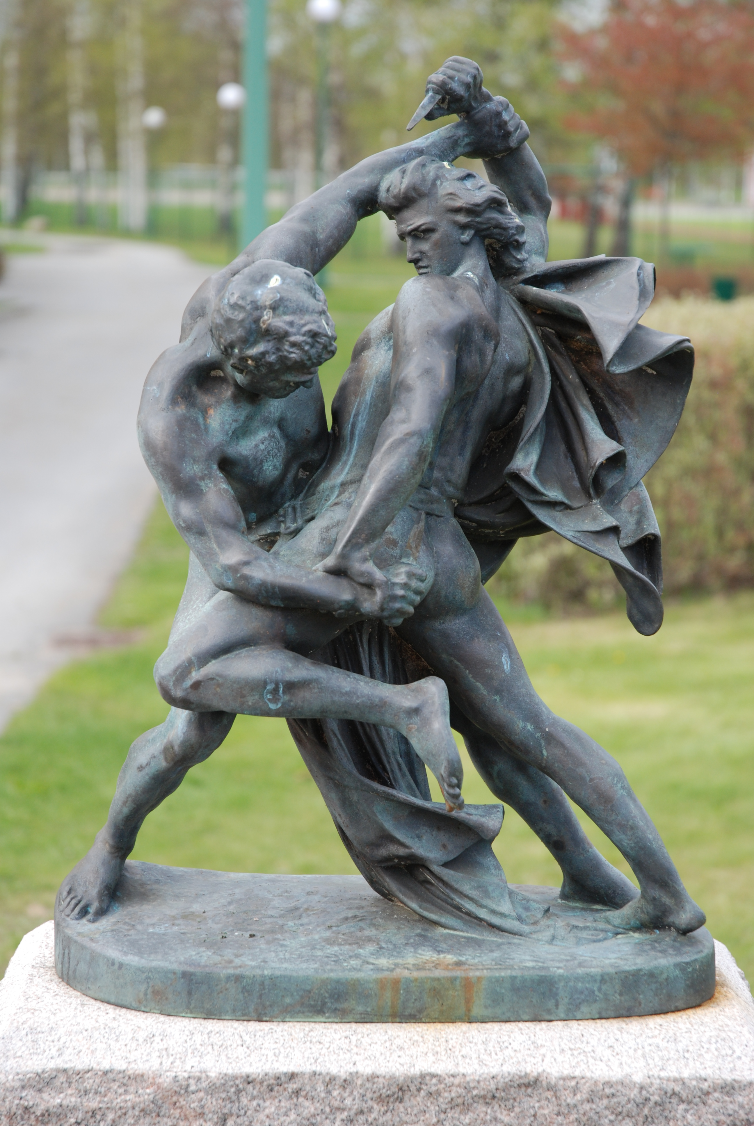 Johan Peter Molin´s Bältesspännare, Hällefors, Sweden